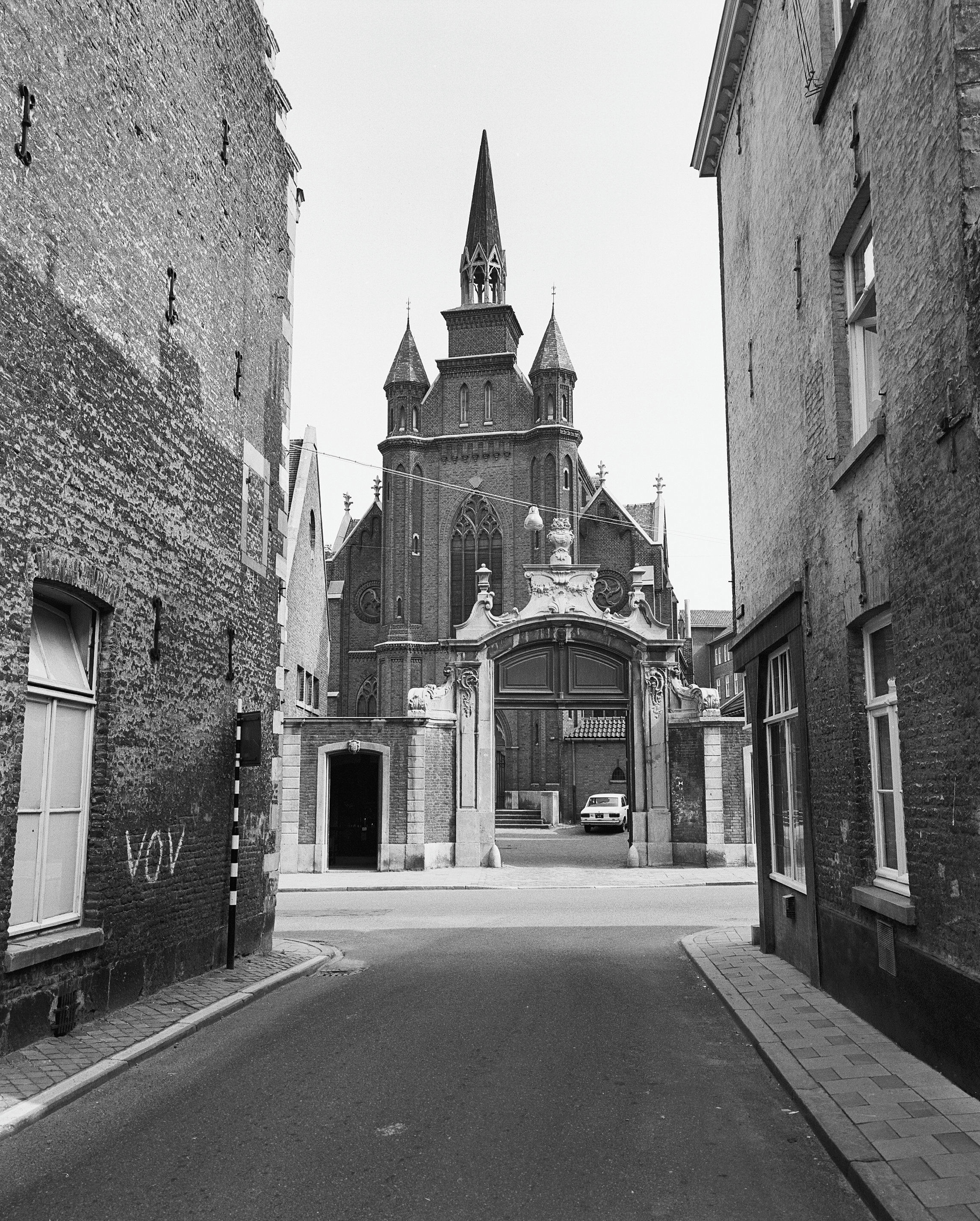 Maastricht: Zicht vanuit de Abtstraat op de poort van het grotendeels gesloopte Huis Vilain XIIII met daarachter de voormalige Heilig Hartkerk, ofwel Tweede Jezuïetenkerk (1868-1976), eertijds onderdeel van het nog bestaande Canisianum (Jezuïetenklooster).